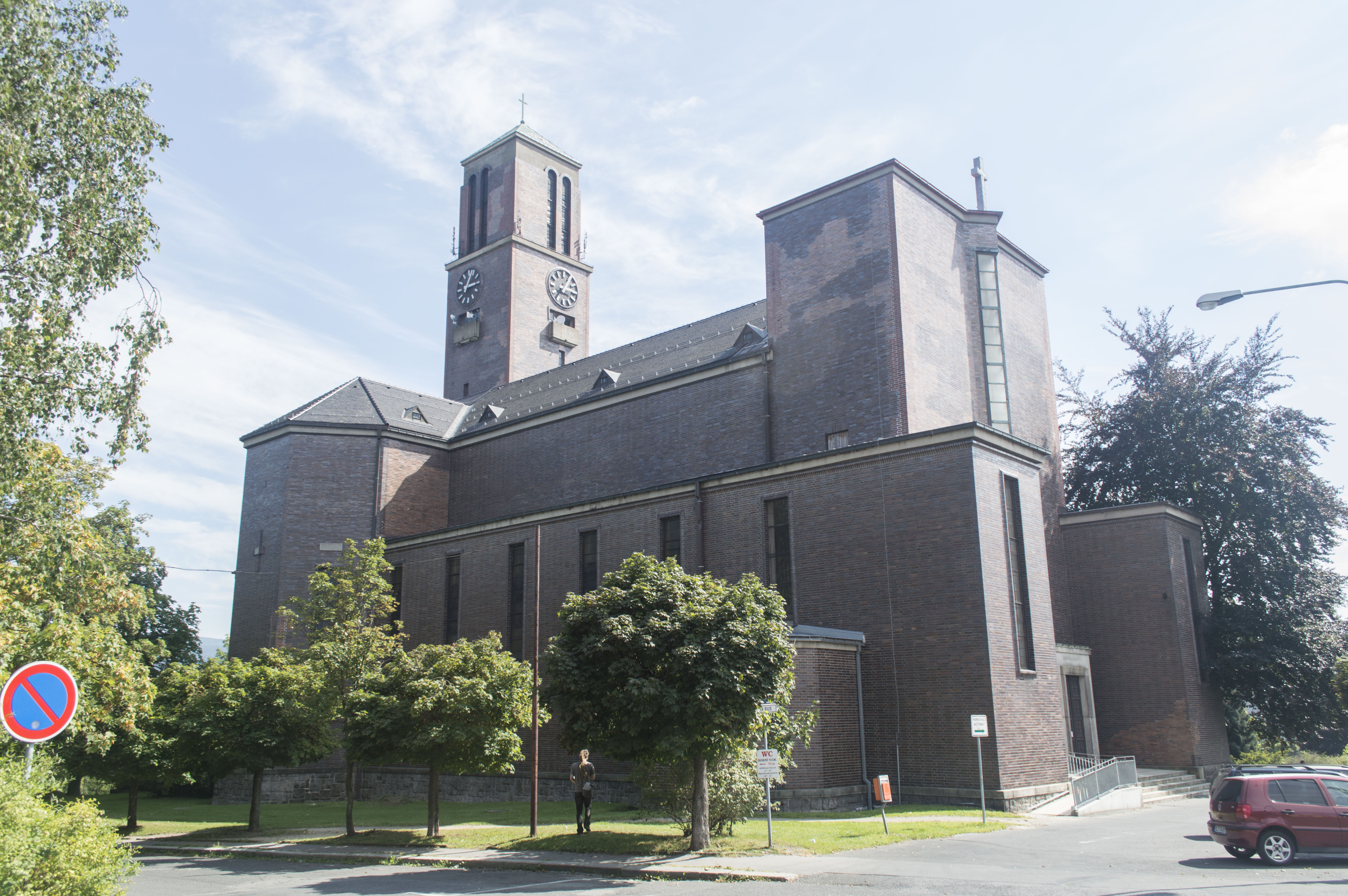 Kostel Nejsvětějšího srdce Páně v Jablonci nad Nisou.